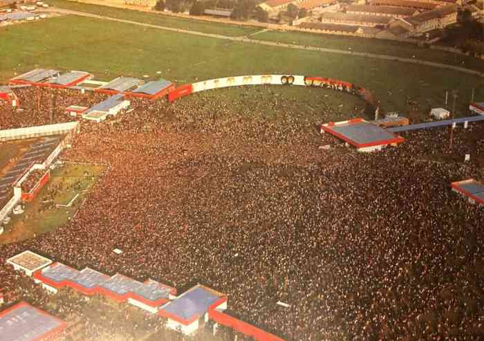 Comizio di Enrico Berlinguer del 18 settembre 1977 durante la festa nazionale dell'Unità di Modena. All'epoca fu stimata un'affluenza di 500.000 persone